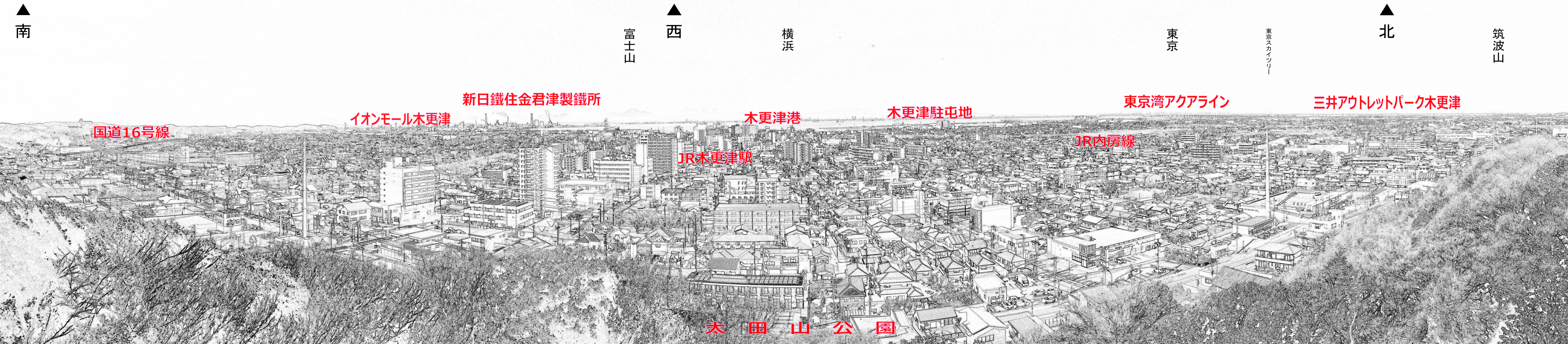 File:Panorama KisarazuCity 20190101.pngを、スケッチ画像に変換し、絵中の施設が特定しやすいように説明文を付け加えた。